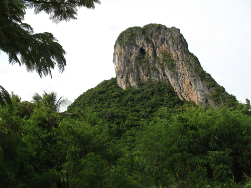 Khao Ok Thalu, landmark of Phatthalung.